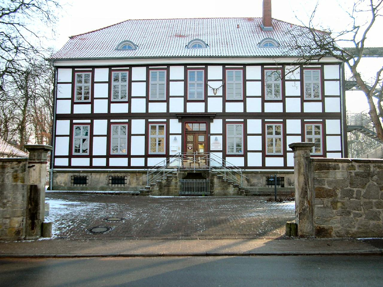 Das ehemalige Forstamt in Coppenbrügge Jetzt ist dort ein Kindergarten